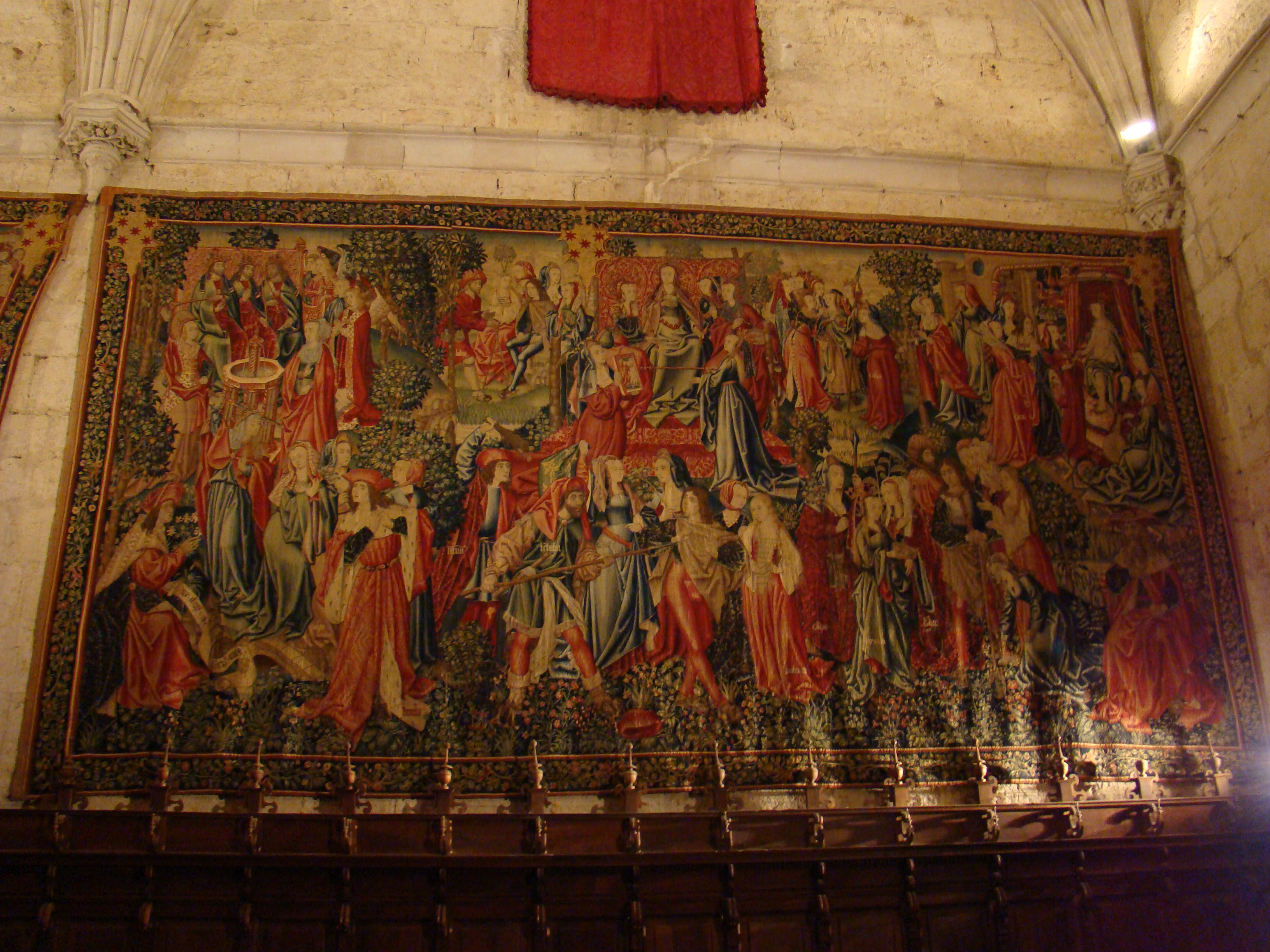 Sice illos a facie mea. Parte de una colección de tapices de la catedral de Palencia (España). Fueron adquiridos en los Talleres de Bruselas y en los de Marche-Crétif, que era el tapicero de Francisco I de Francia. on tres series bien diferenciadas que siguen ciclos narrativos distintos, cuyos donantes fueron el obispo Juan Rodríguez de Fonseca y el Dr. Arroyo, canónigo de Palencia y magistral de Valladolid. El tapiz se conserva en la Sala Capitular de la catedral de san Antolín de Palencia, provincia de Palencia, (España).